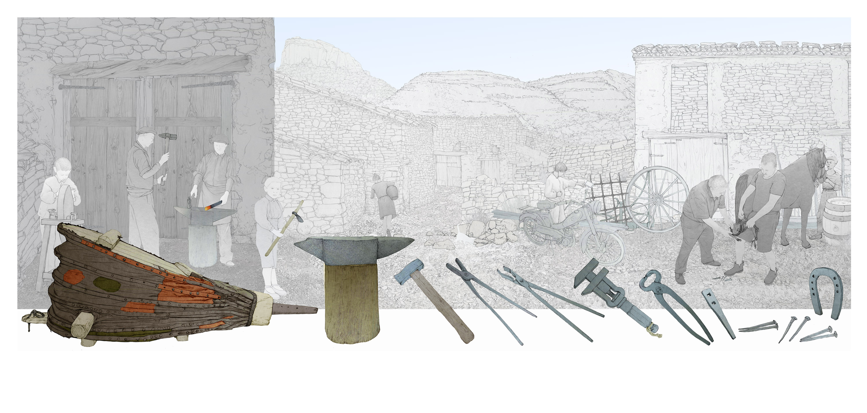 Il·lustracions d'Andrés Marín Jarque per a l'exposició permanent "Secà i Muntanya" del Museu Valencià d'Etnologia. S'il·lustren els escenaris del medi rural i el procés (treball) mitjançant el qual s'aprofita este espai.